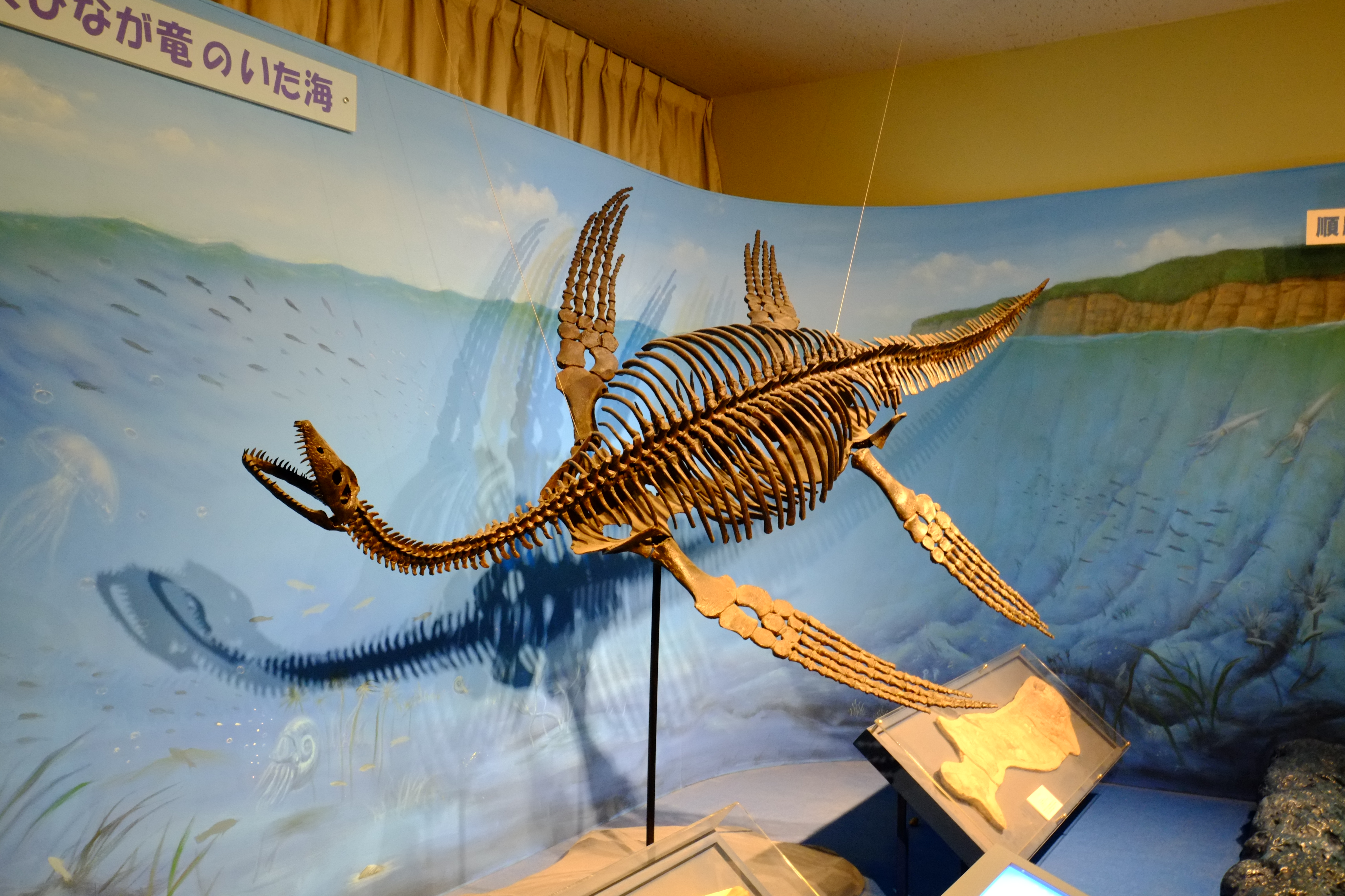 プレシオサウルス。イルカのように胎児を生んで育てることが近年わかっている。